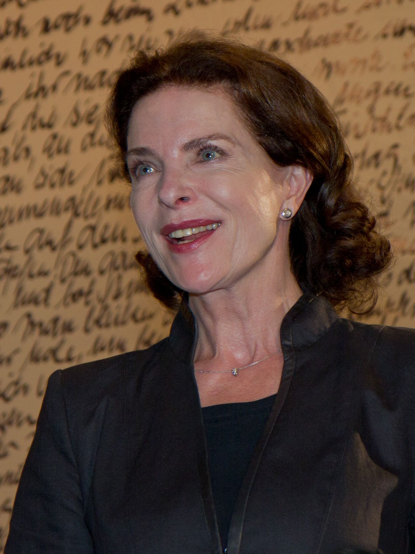 Gudrund Landgrebe (* 20. Juni 1950 in Göttingen), deutsche Schauspielerin.